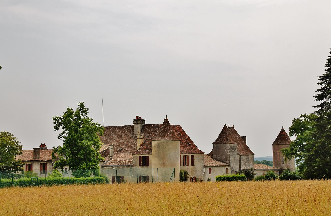 Château Castagens